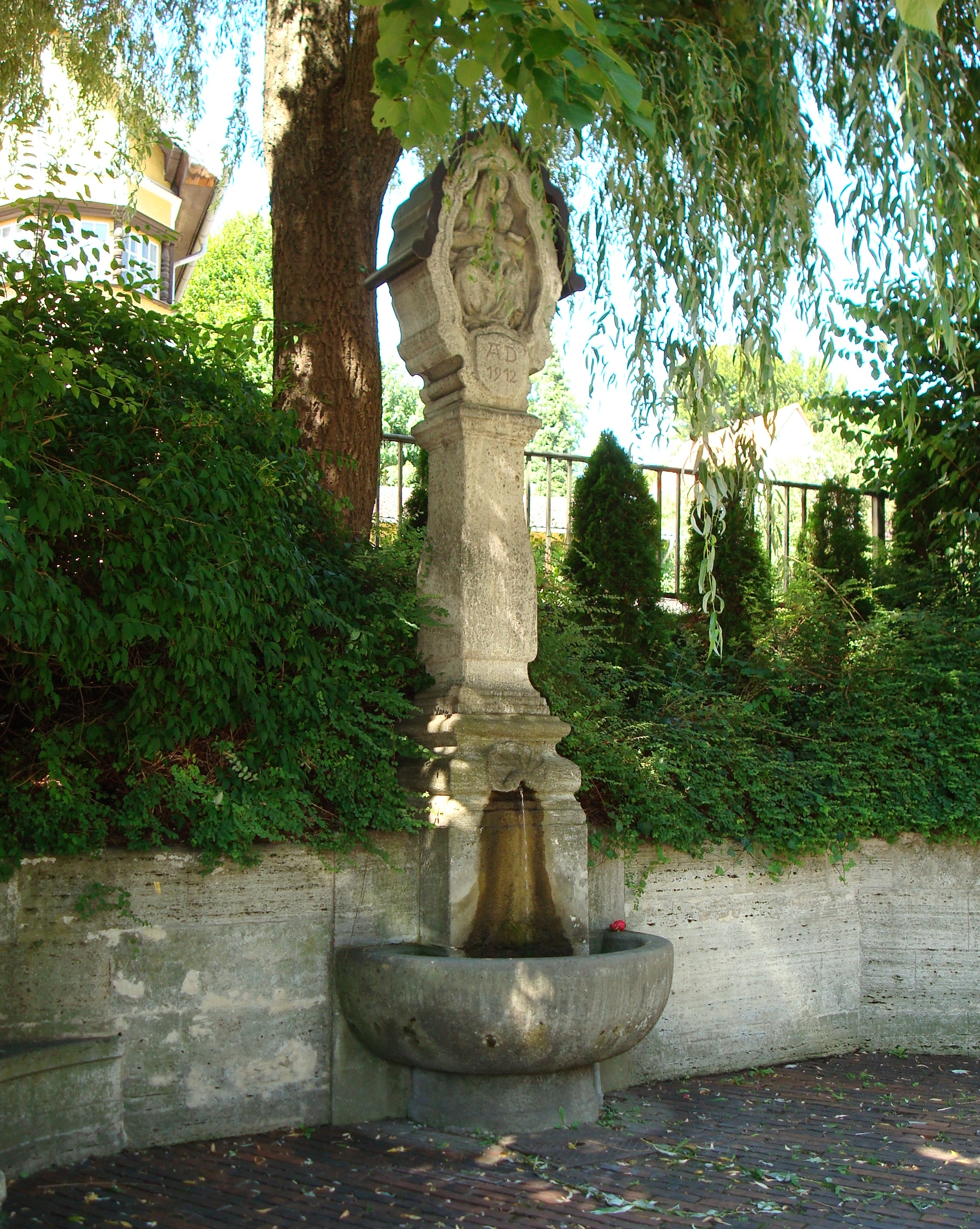 Starnberg, Nähe Theresienstraße 12, Marienbrunnen. 1912 von Apotheker Vinzenz Gresbek als Dank dafür gestiftet, dass ihm nach vier Söhnen als fünftes Kind eine Tochter geboren wurde. Der Entwurf stammt vom Münchener Kunstprofessor Friedrich Grombach, das Relief vom österreichischen Bildhauer Michael Rauscher.[1] This is a photograph of an architectural monument.